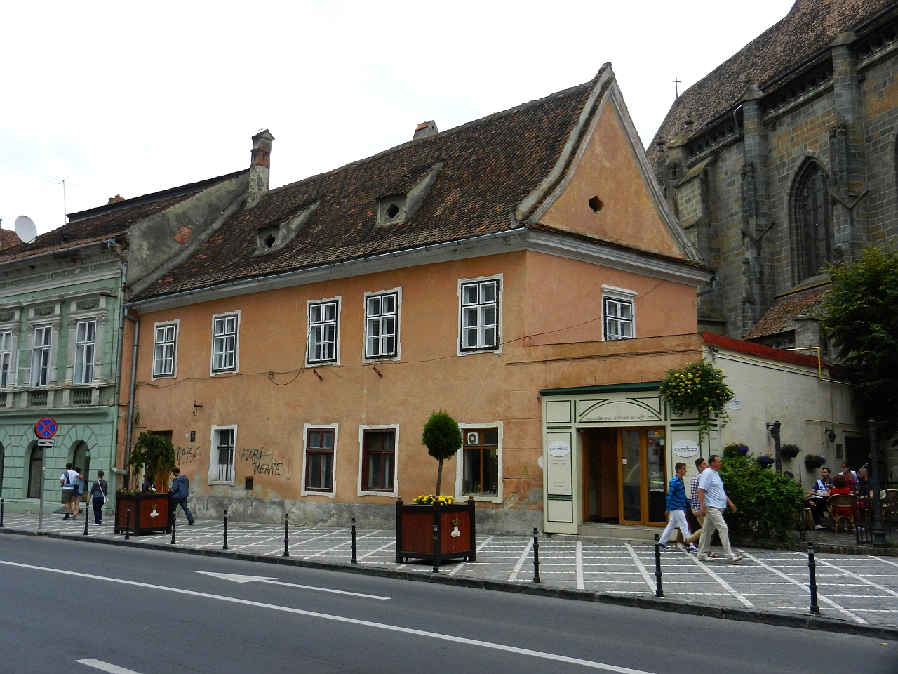 Casă sec. XVI-XIX